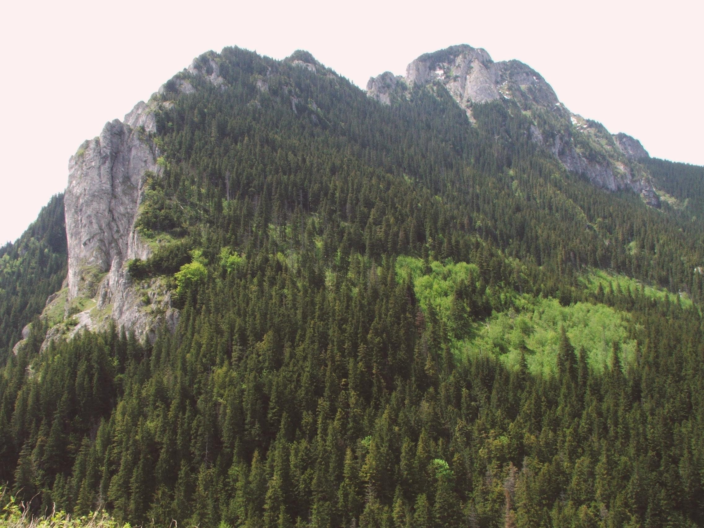 Raptawicka Grań(Dolina Kościeliska)